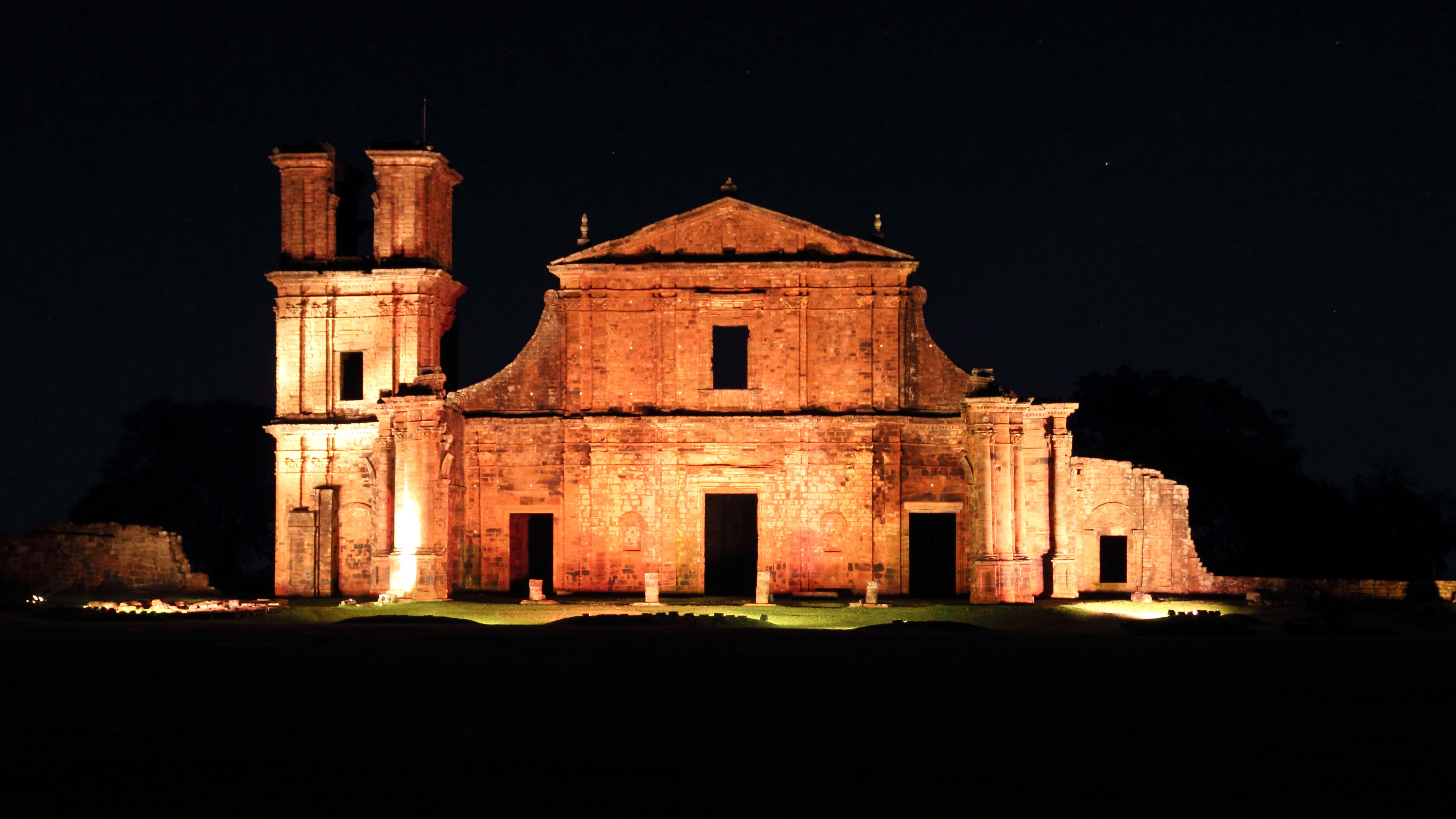 Sítio Arqueológico de São Miguel Arcanjo em São Miguel das Missões, RS.